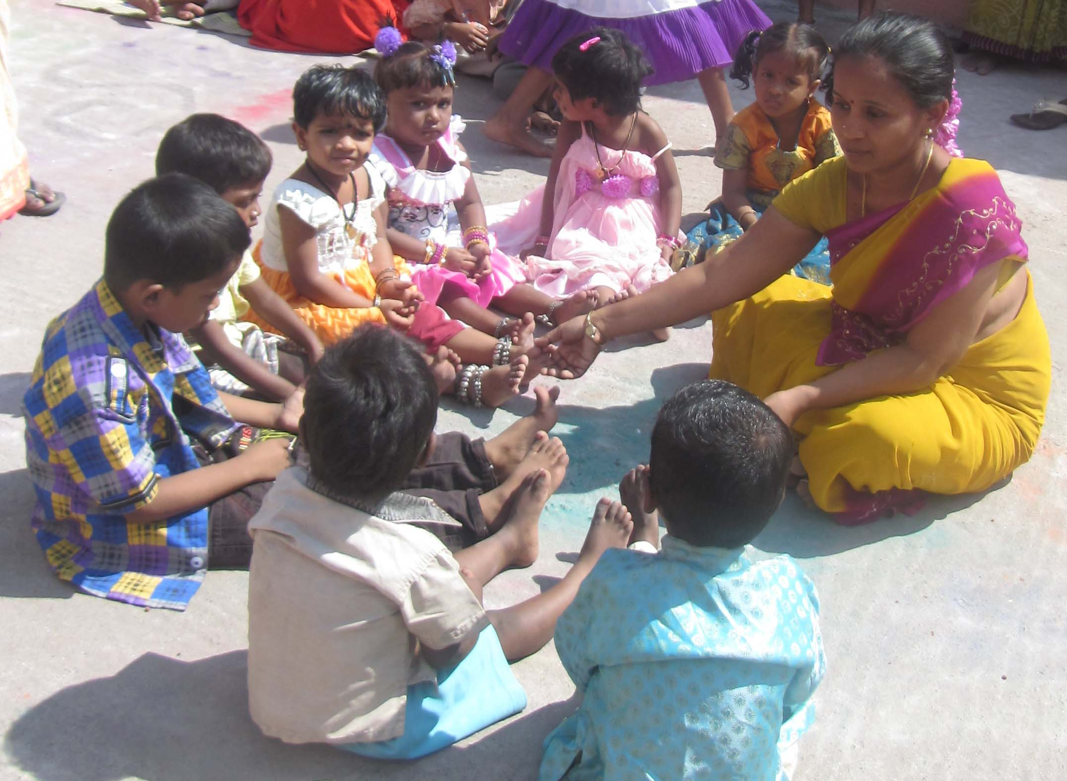 'அட்டலங்காய் புட்டலங்காய்' விளையாட்டு